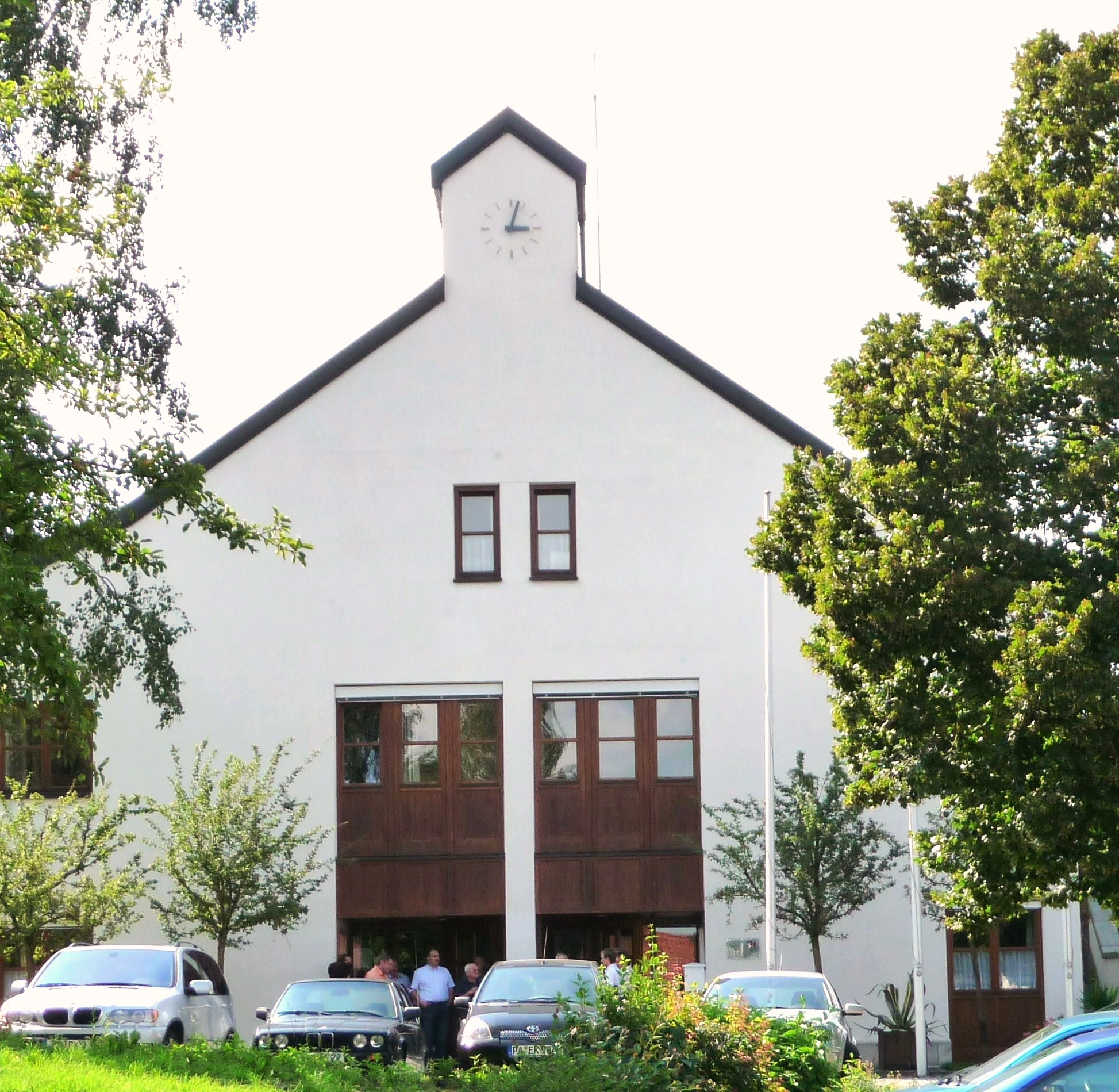 Das Rathaus der Gemeinde Neuburg am Inn in Neukirchen am Inn